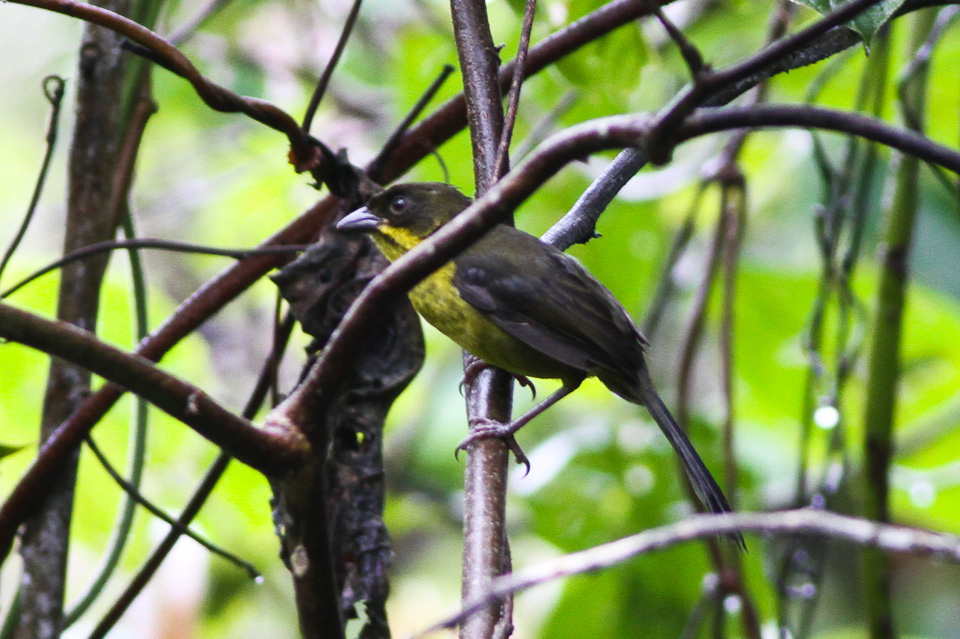 San Augustin,Huila